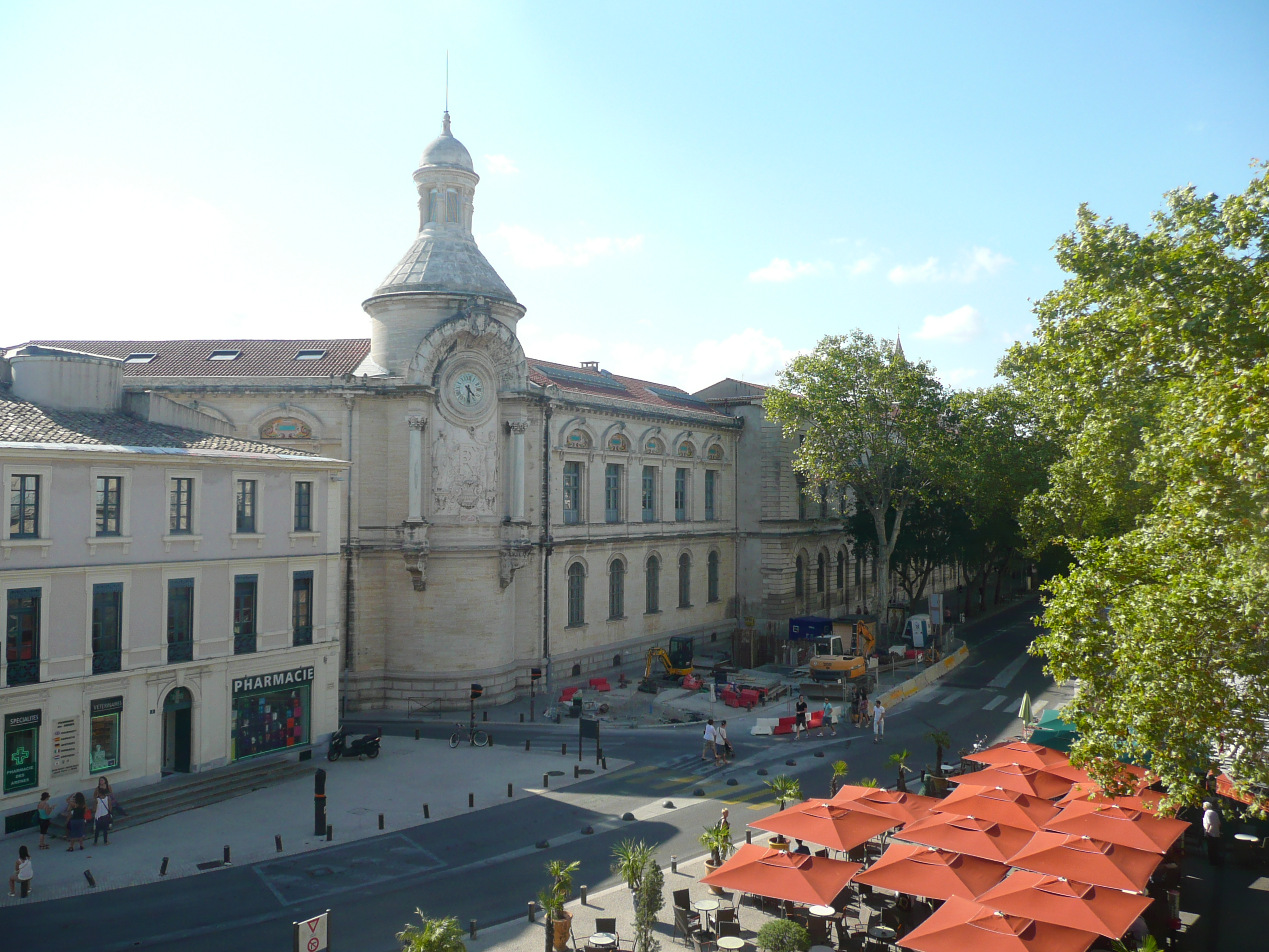 Průčelí budovy a orloj